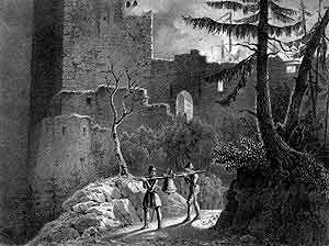 Phantasiezeichnung der 1449 zerstörten Burg Balm bei Lottstetten